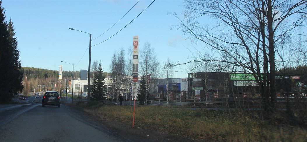 Leväsentietä Leväsentie 2:n kohdalla Kuopion Leväsen kaupunginosassa. Keskellä Kauppakeskus Cantin mainostolppa, kuvan oikeassa laidassa osa Kauppakeskus Cantin rakennuksista. Kuvan vasemmassa osassa ja keskellä (sinertävä rakennus K-rauta Naumanen) olevat rakennukset kuuluvat Kauppapaikka Hermanniin.